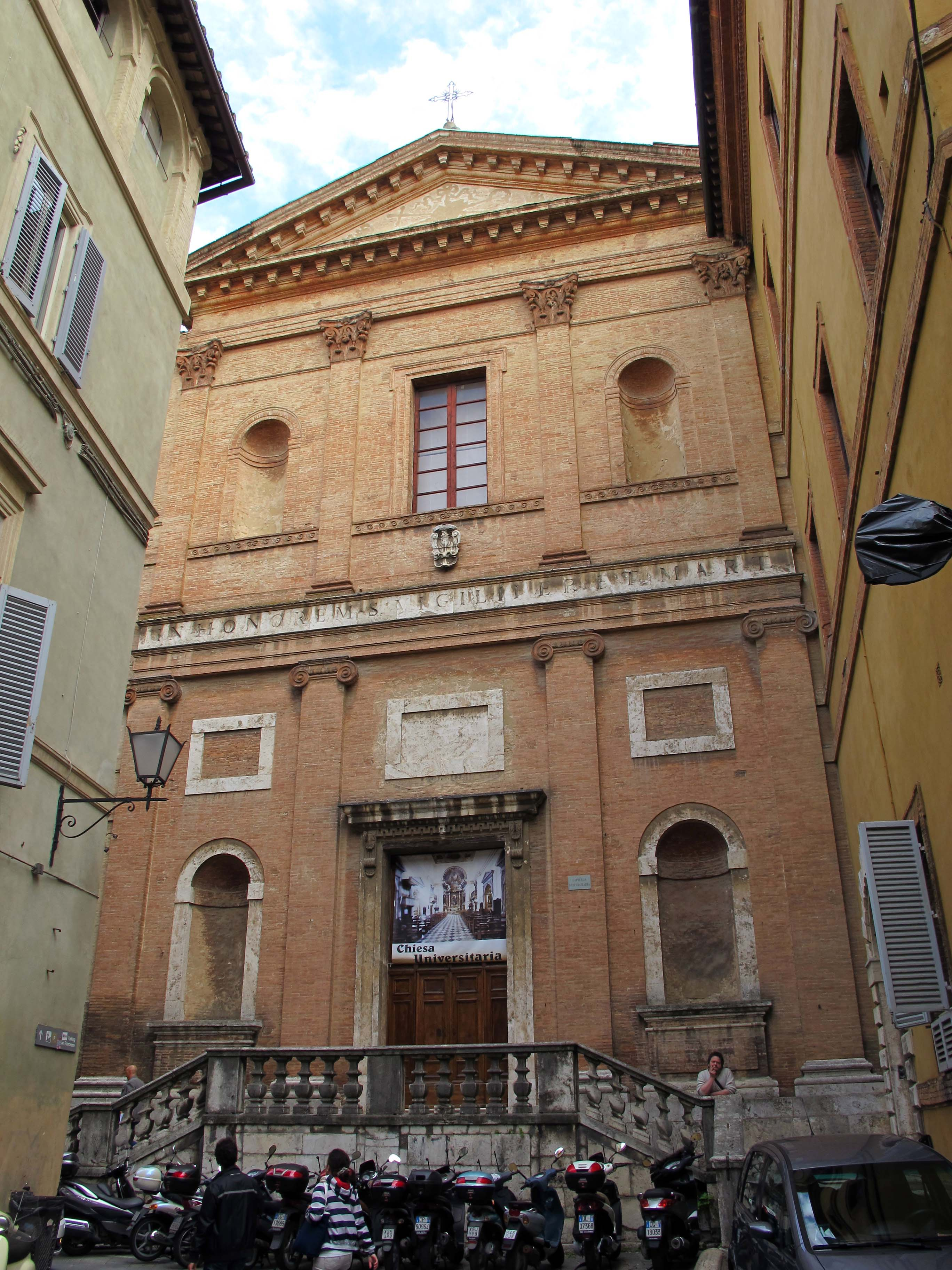 Siena